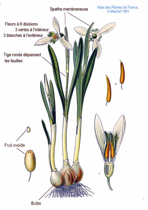 Galanthus L.